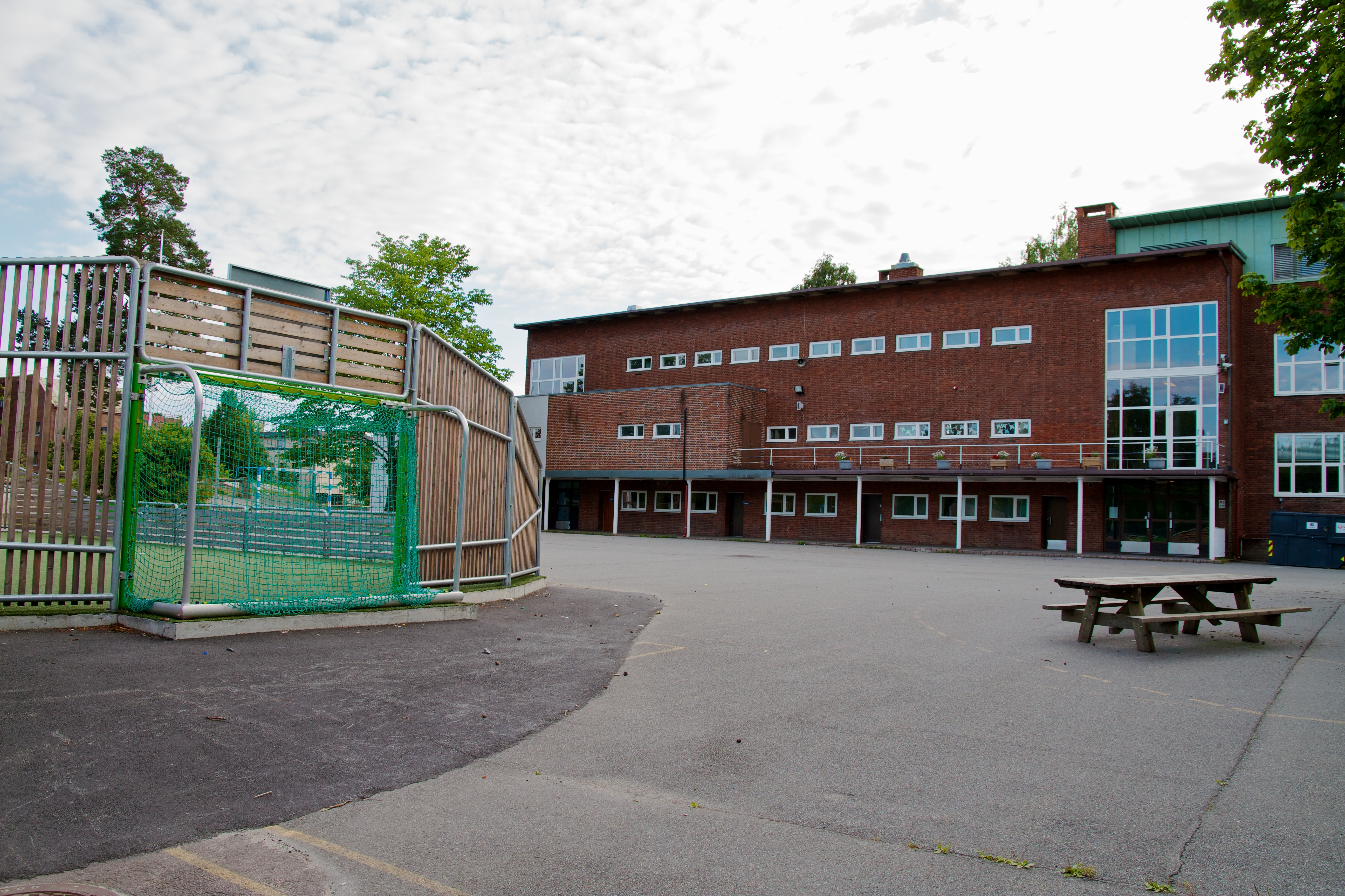 Slemdal skole i Oslo.